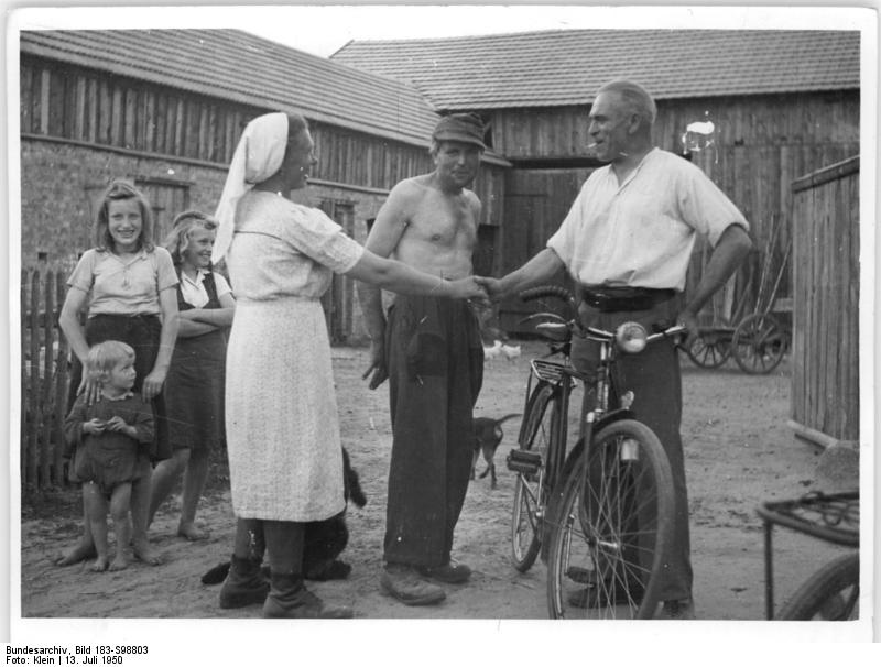 Gebersdorf, Bürgermeister Vertriebene begrüßend Leben und Arbeit der Umsiedler im Land Brandenburg. In Gebersdorf, Kreis Luckenwalde, entstand eine vorbildliche grosse Neubauernsiedlung. Auf die Initiative des Bürgermeister Schröder hin wurde im März 1946 mit dem Bau dieser Siedlung begonnen. Heute ist diese Siedlung fast fertig. Auch diese Siedlung, in der viele Umsiedler eine neue Heimat fanden, ist zum größten Teil aus Abbruchmaterial geschaffen worden. UBz: Hier begrüsst der Bürgermeister die Umsiedler-Neubauernfrau Schirmer, die gerade von der Heuernte gekommen ist.